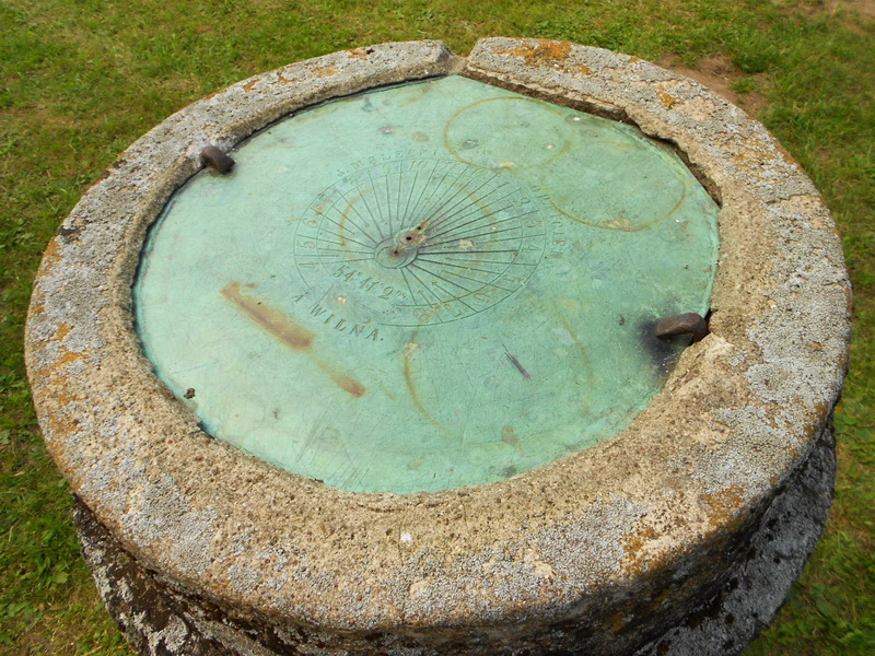 Ішчална. Касцёл. Сонечны гадзіннік